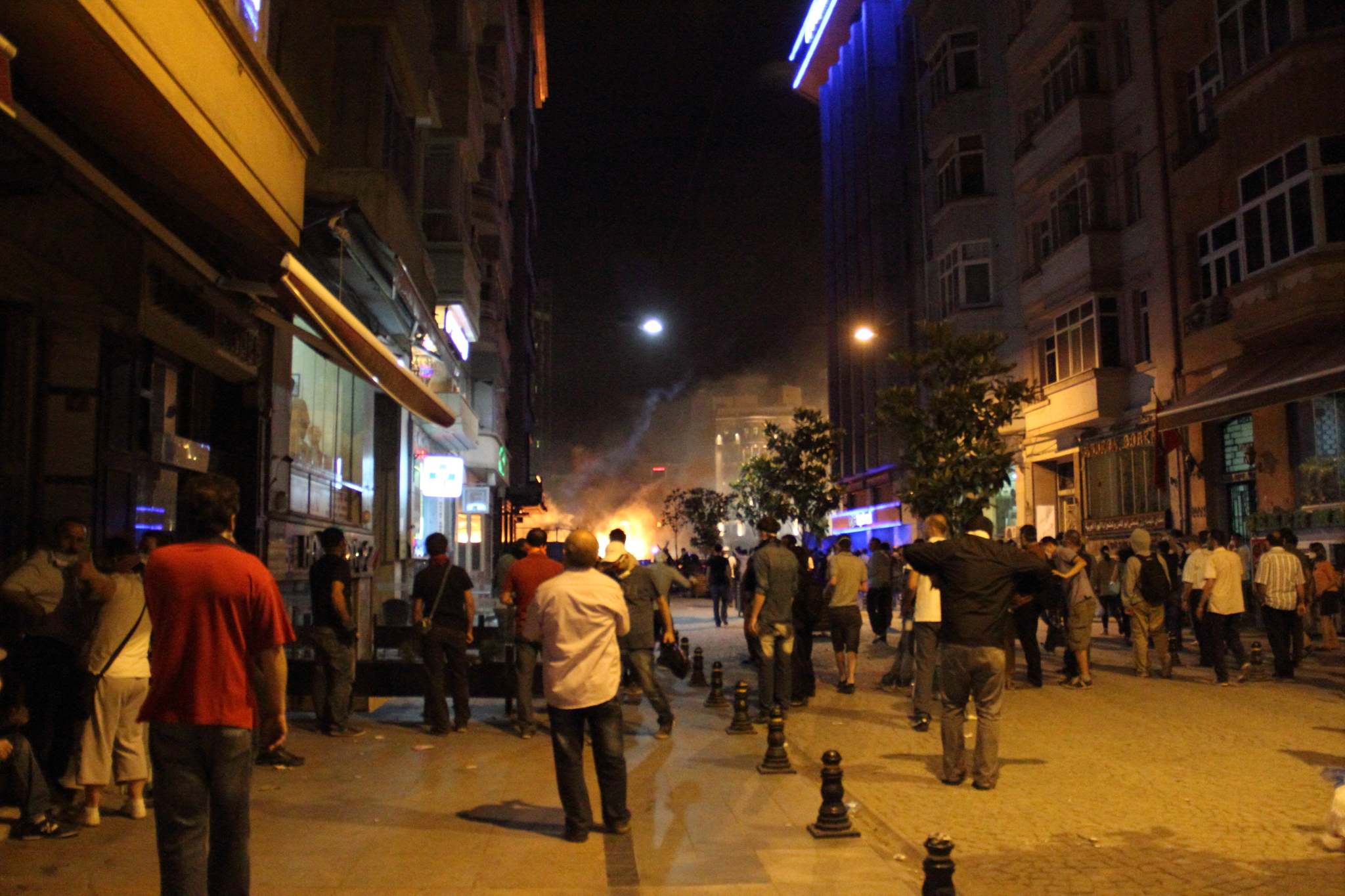 Gezi Parkı Müdahale